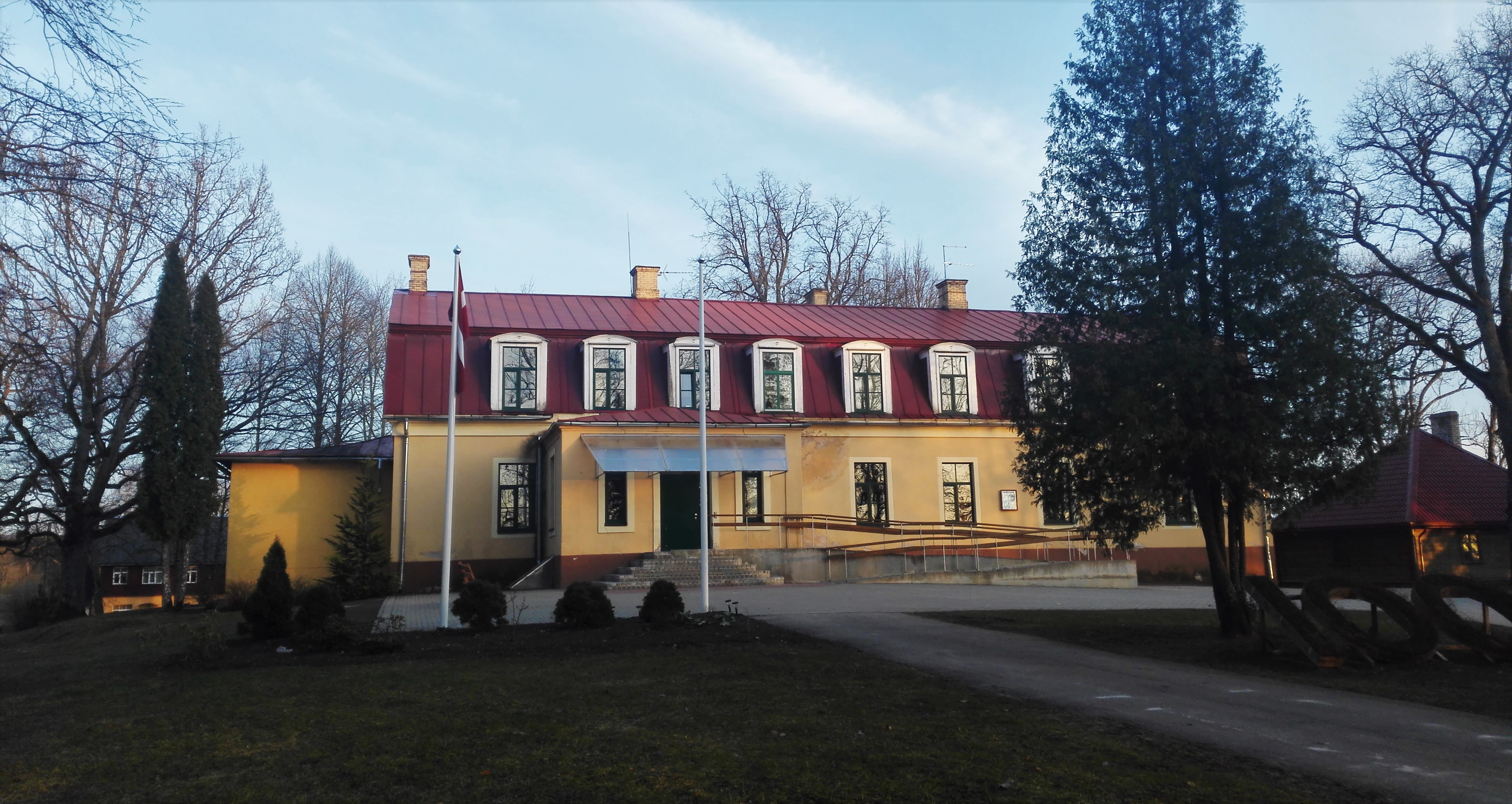 Spāres muižas kungu māja, 2016. gads